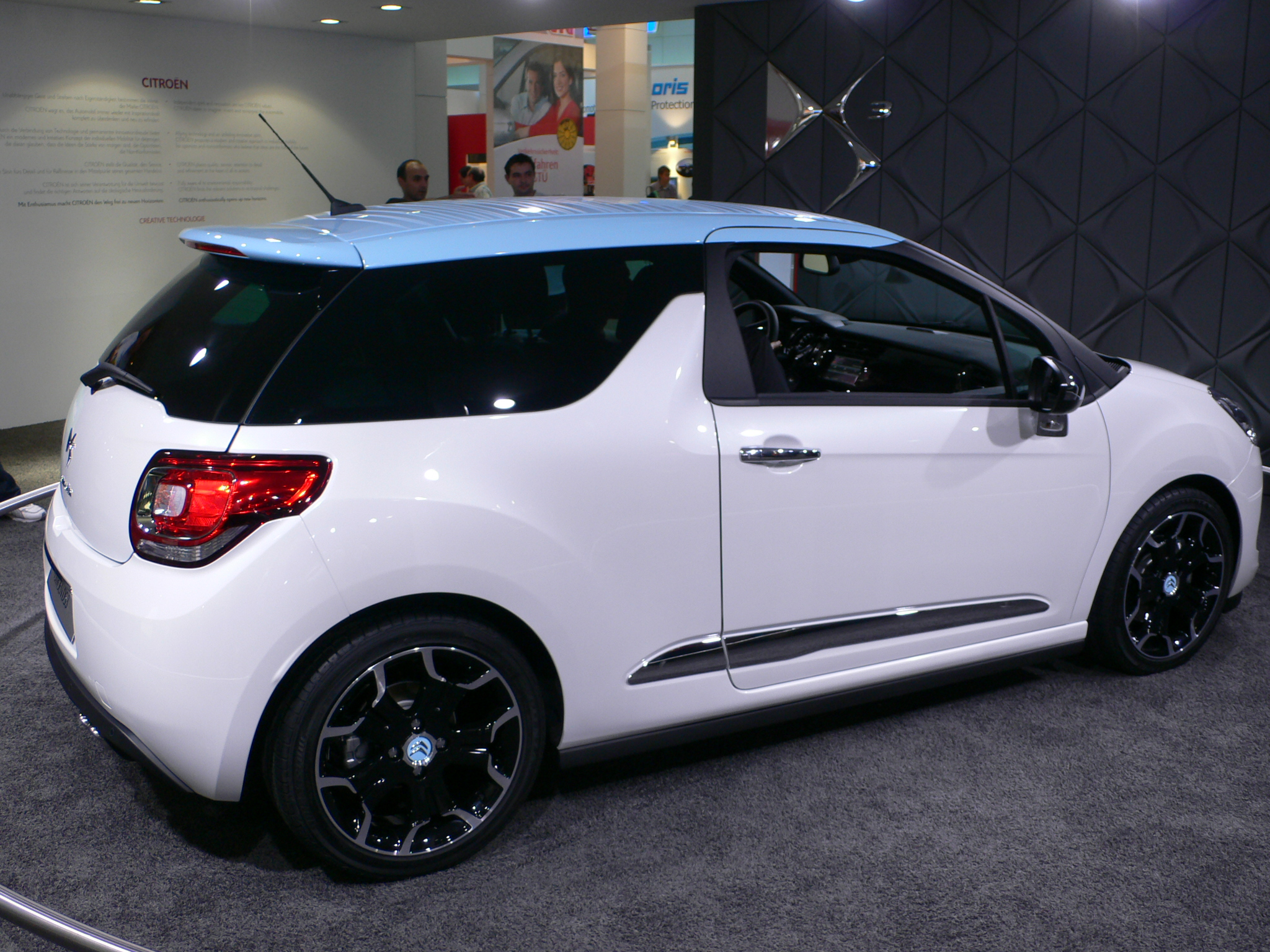 Citroën DS3 au Salon de Francfort 2009